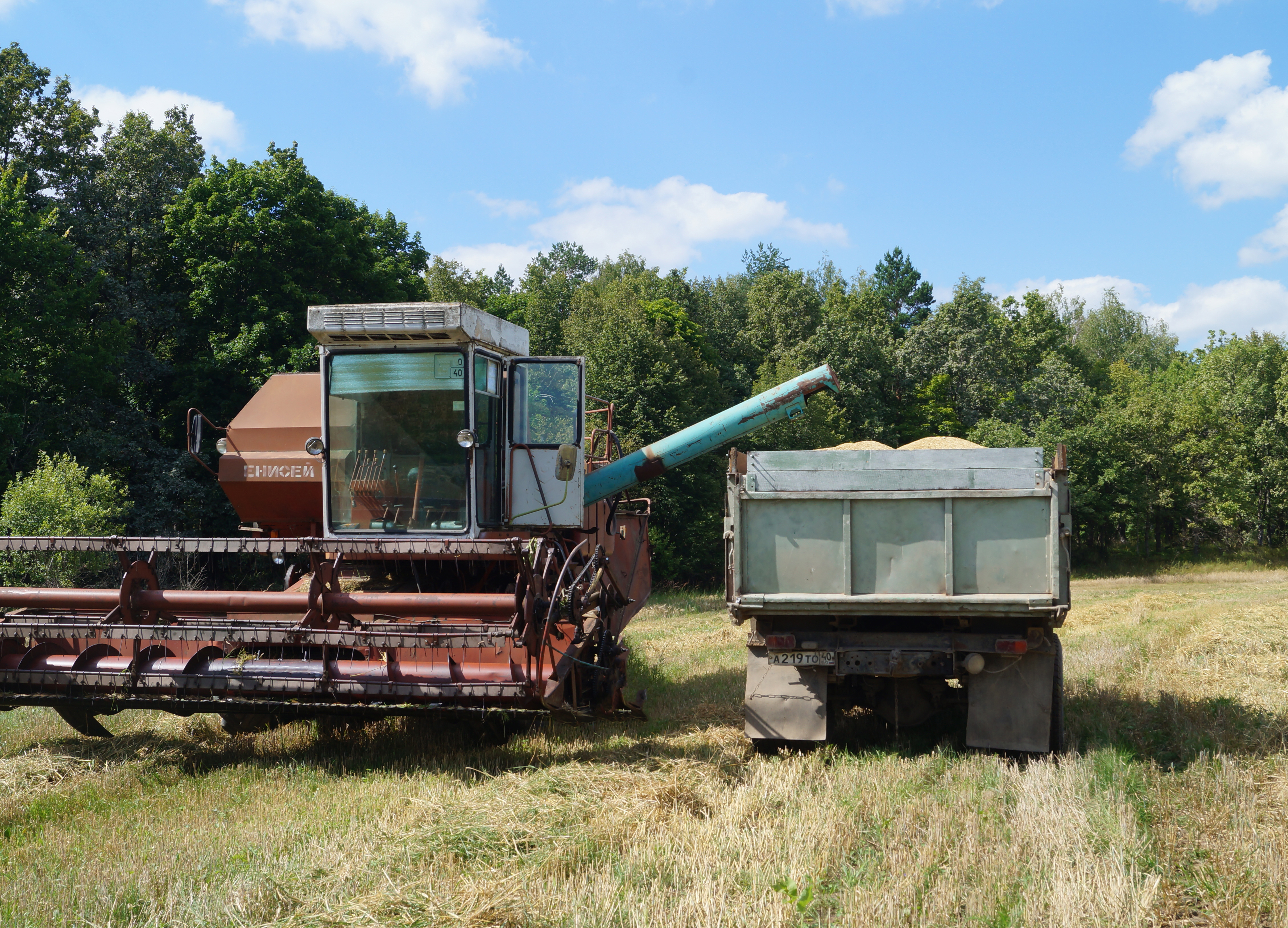 Комбайн Енисей-1200, 2017 год